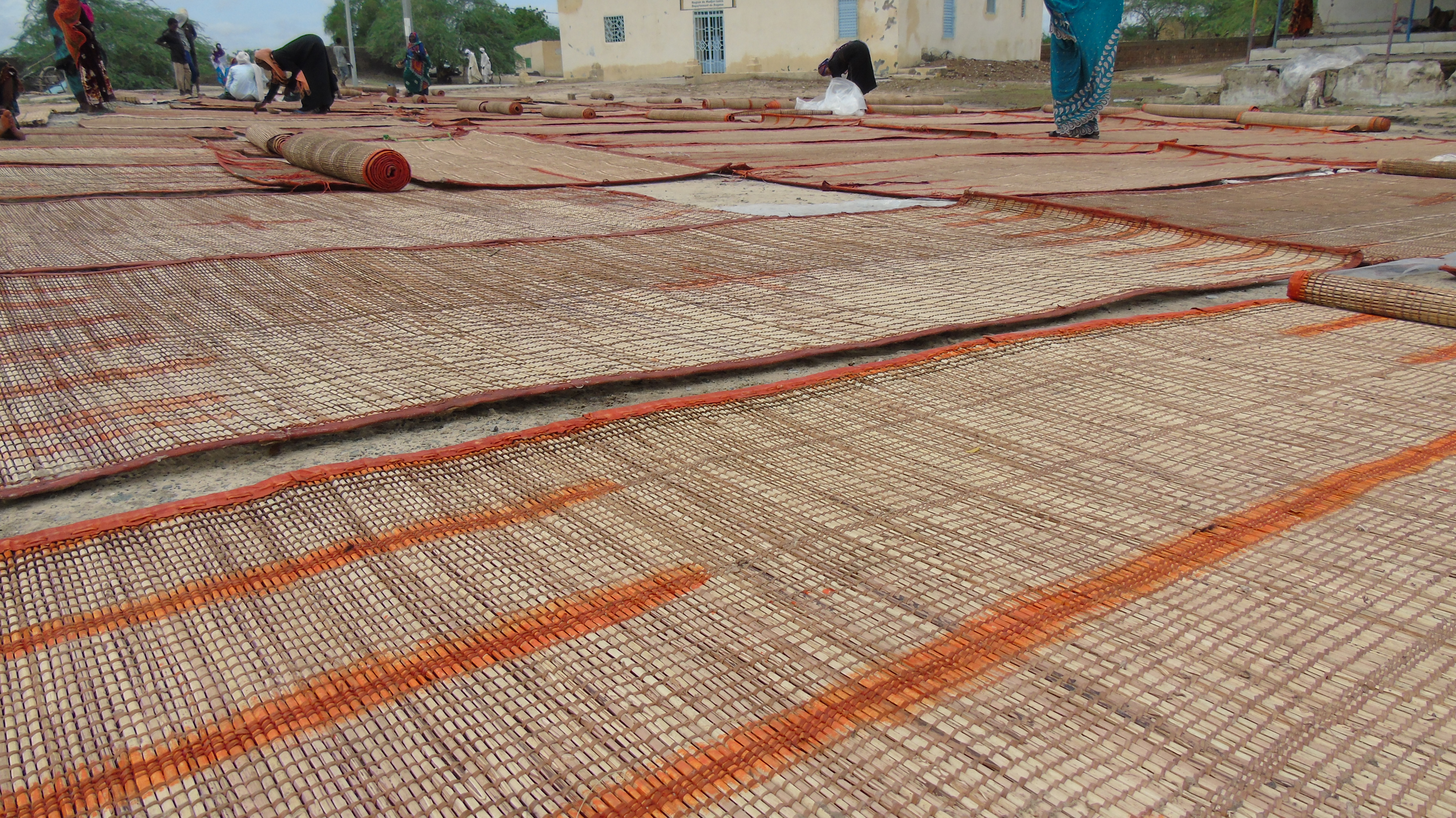 Sorte de paille mélangée avec la peau des bêtes pour fabriquer la natte, le lit traditionnel, le mûr(pour clôturer des cases). Cette photo est prise à Massakory, chef lieu de la province du Hadjer lamis (Tchad)